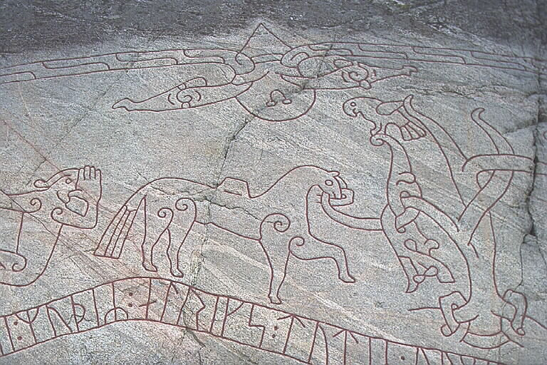 Detalj av Ramsundsristningen: Sigurds häst Grane vid trädet samt en av de två fåglarna. Motiv: Sö101 Jäder, Ramsundsdsristningen Nyckelord: Riksintressen, Runor Kategori: Hällristning, Runristning/runsten Detalj av Ramsundsristningen: Sigurds häst Grane vid trädet samt en av de två fåglarna. Sö101 Jäder, Ramsundsdsristningen.